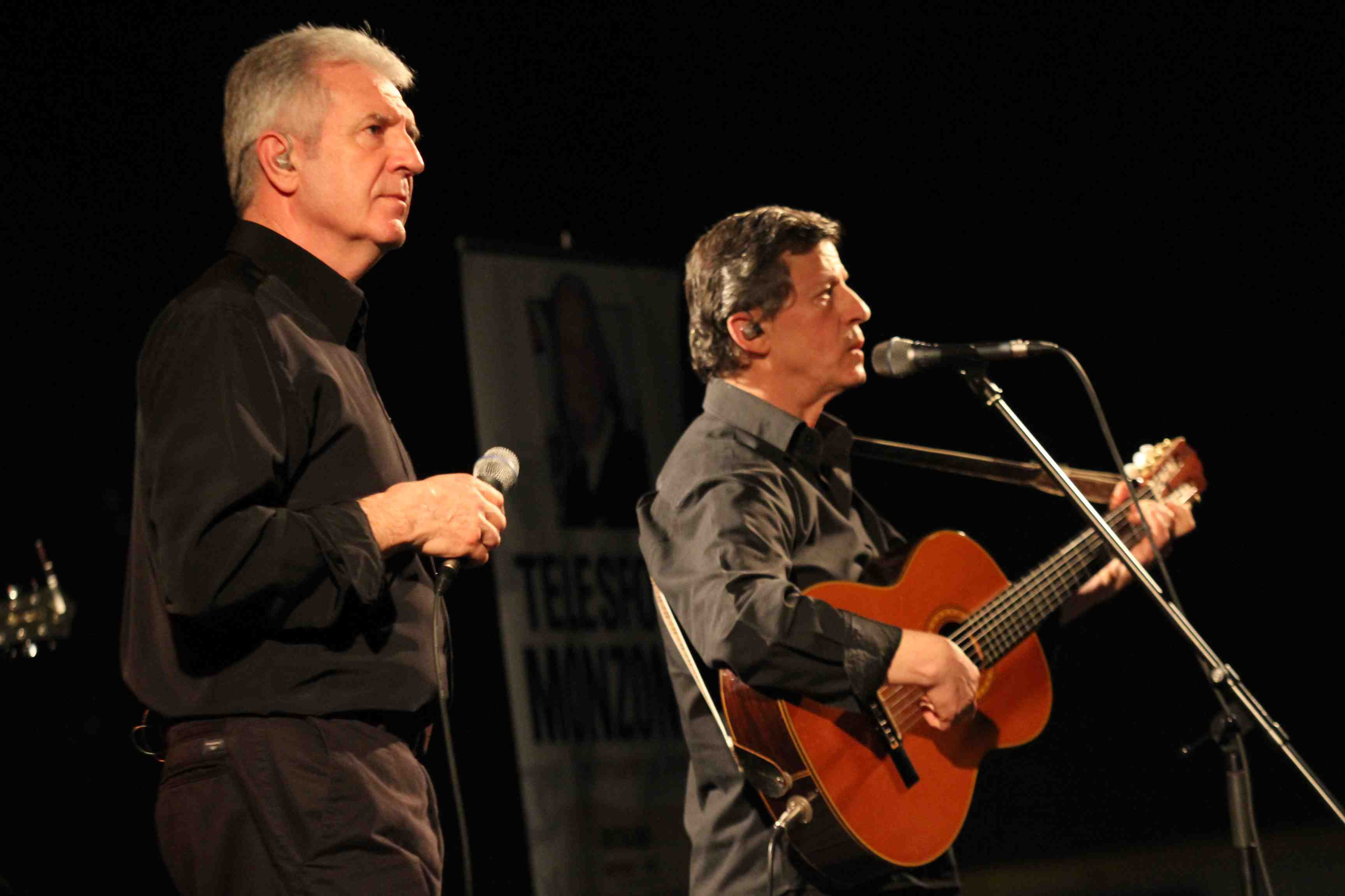 Pantxoa eta Peio 2011n.